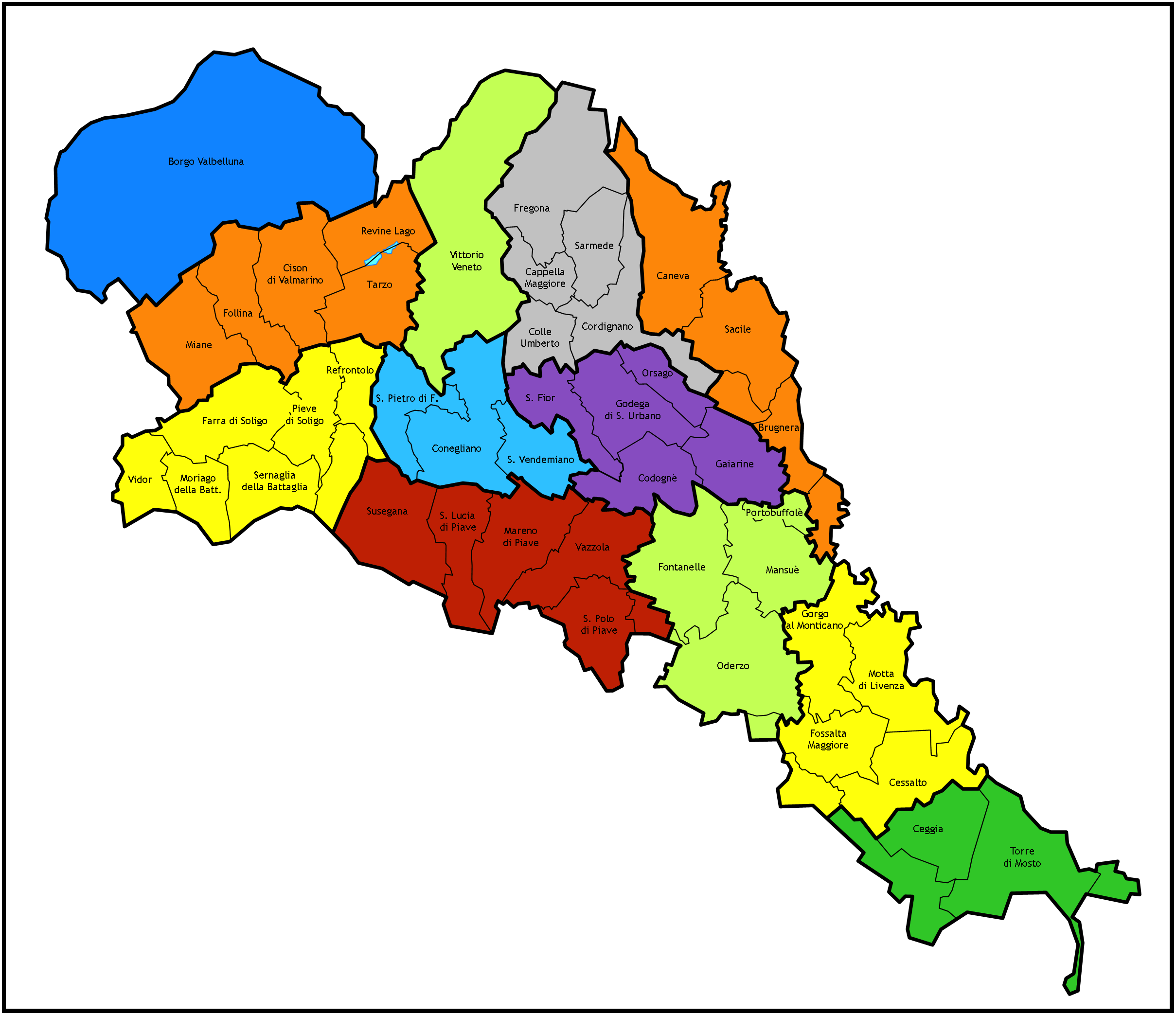 Mappa delle foranie della Diocesi di Vittorio Veneto (TV)